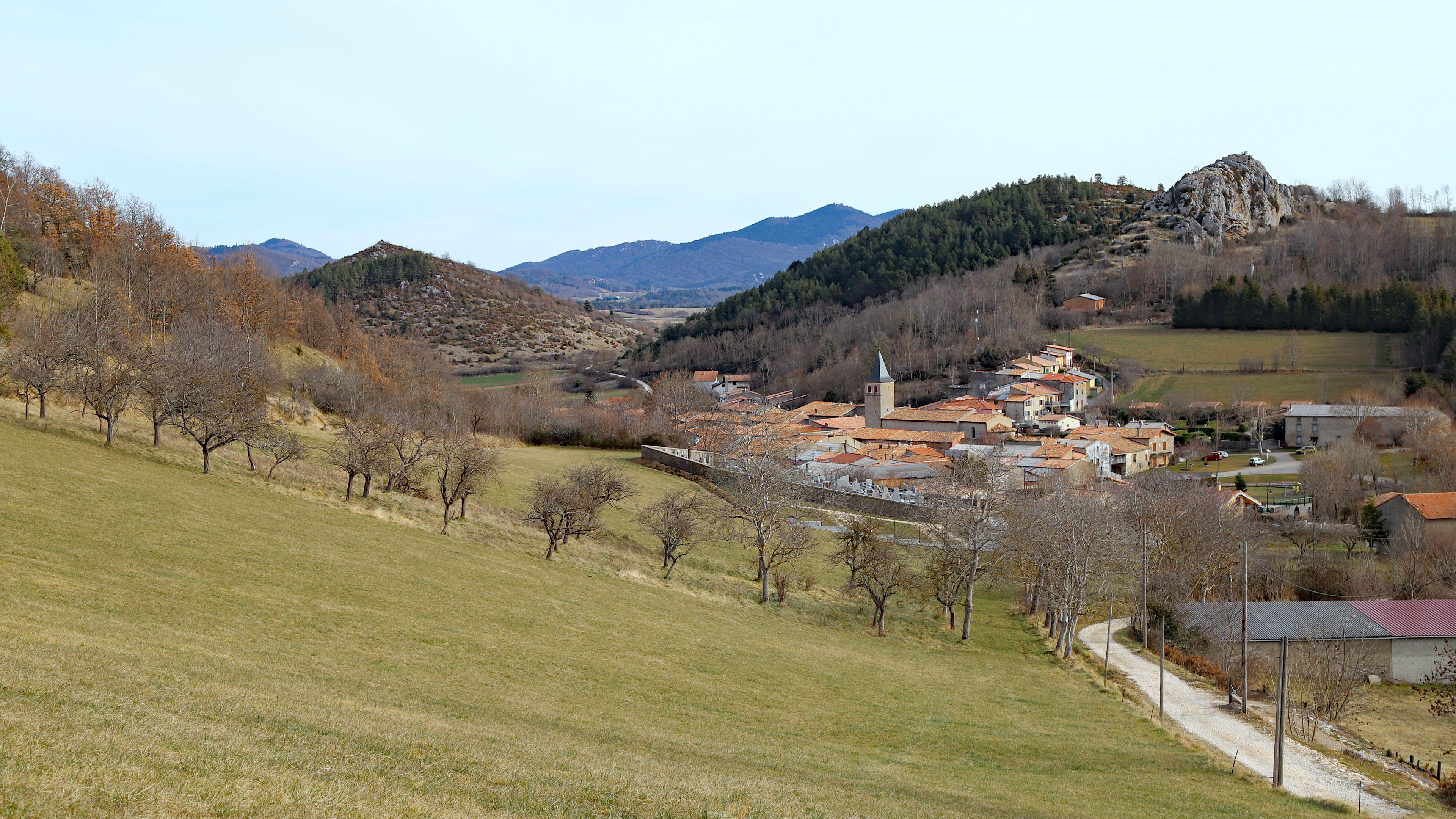 Vue de l'ouest